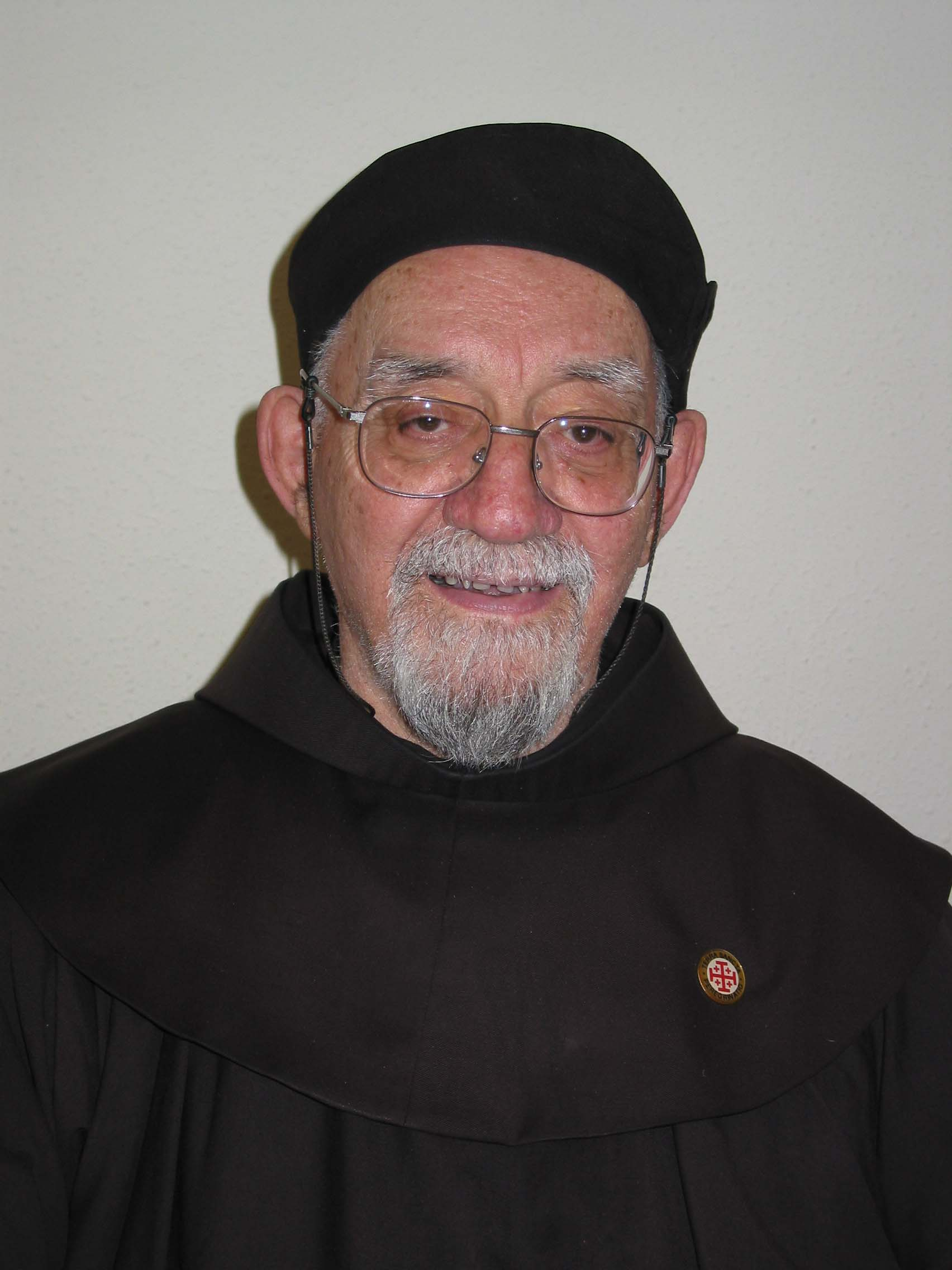 Fr Emauele_Testa OFM (1923-2011)